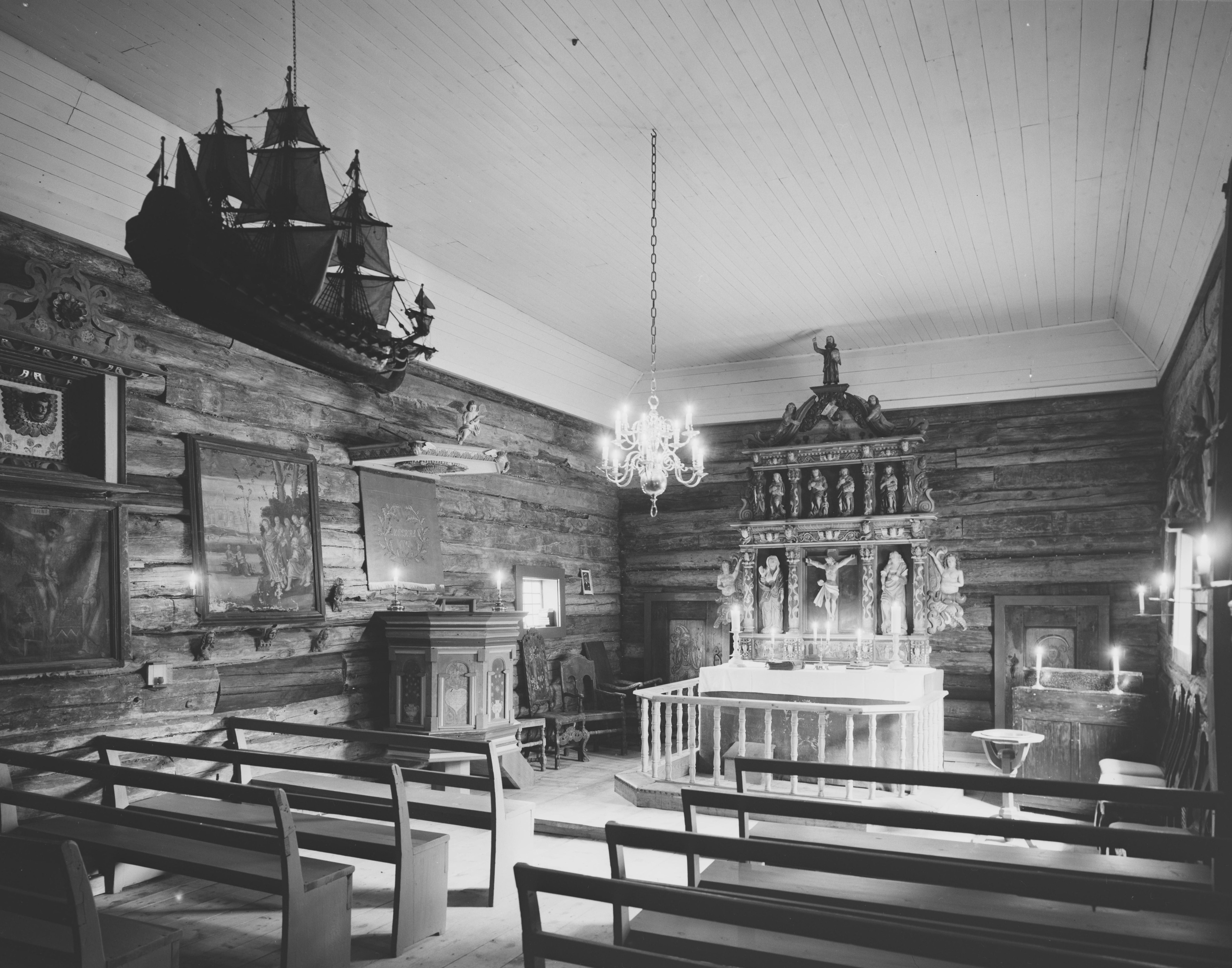 Interiør i Romsdalsmuseets kapell, omtalt som Molde kirke hos Nasjonalbiblioteket. Foto: Jac Brun.